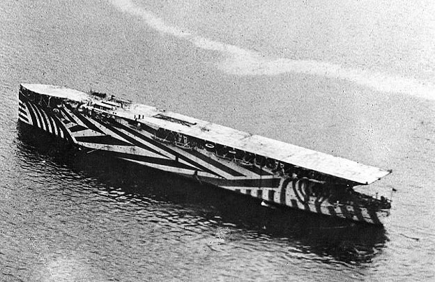 HMS Argus,1918